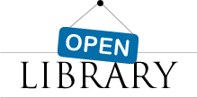 Logo do site Open Library.